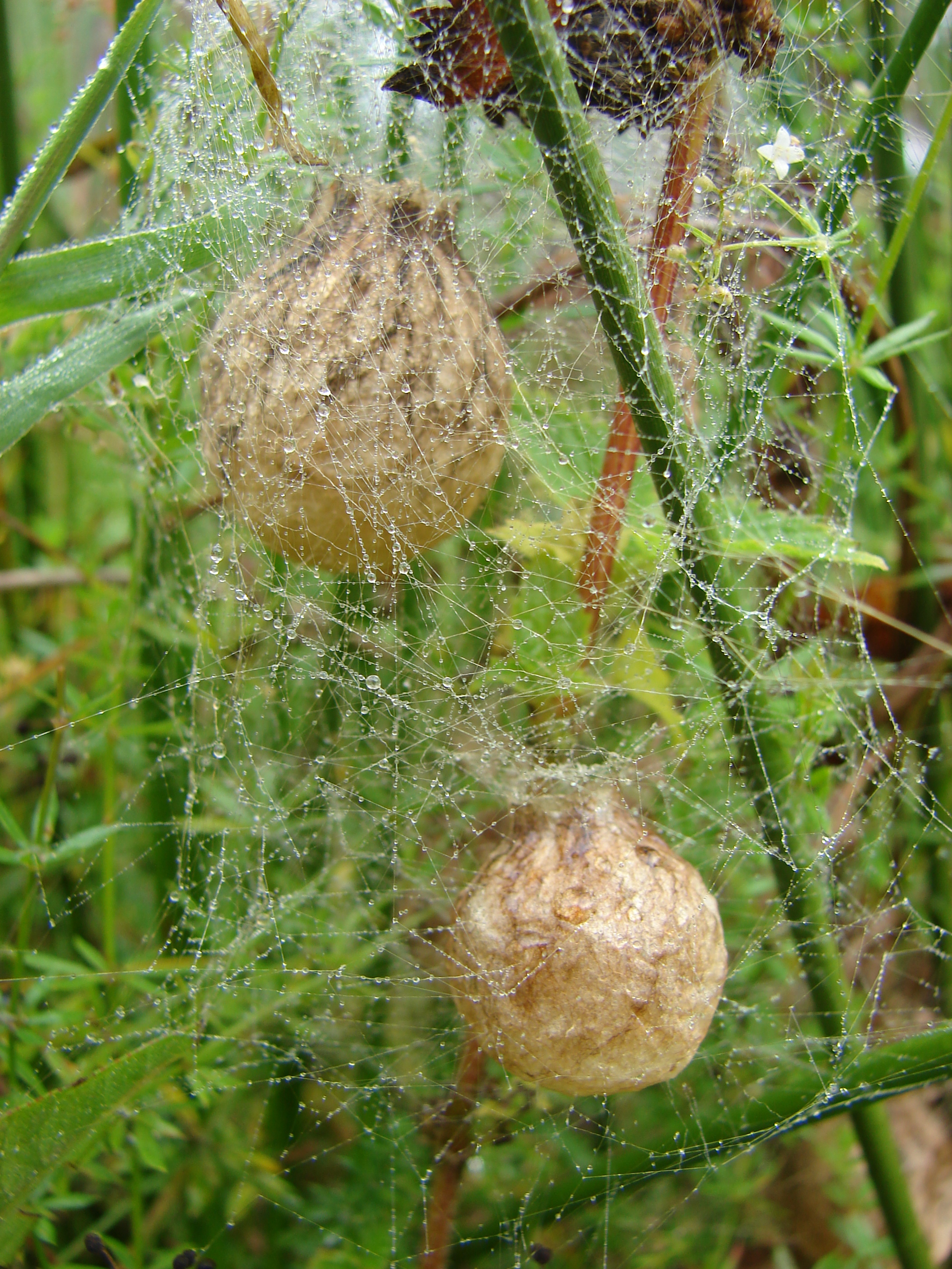 kokon